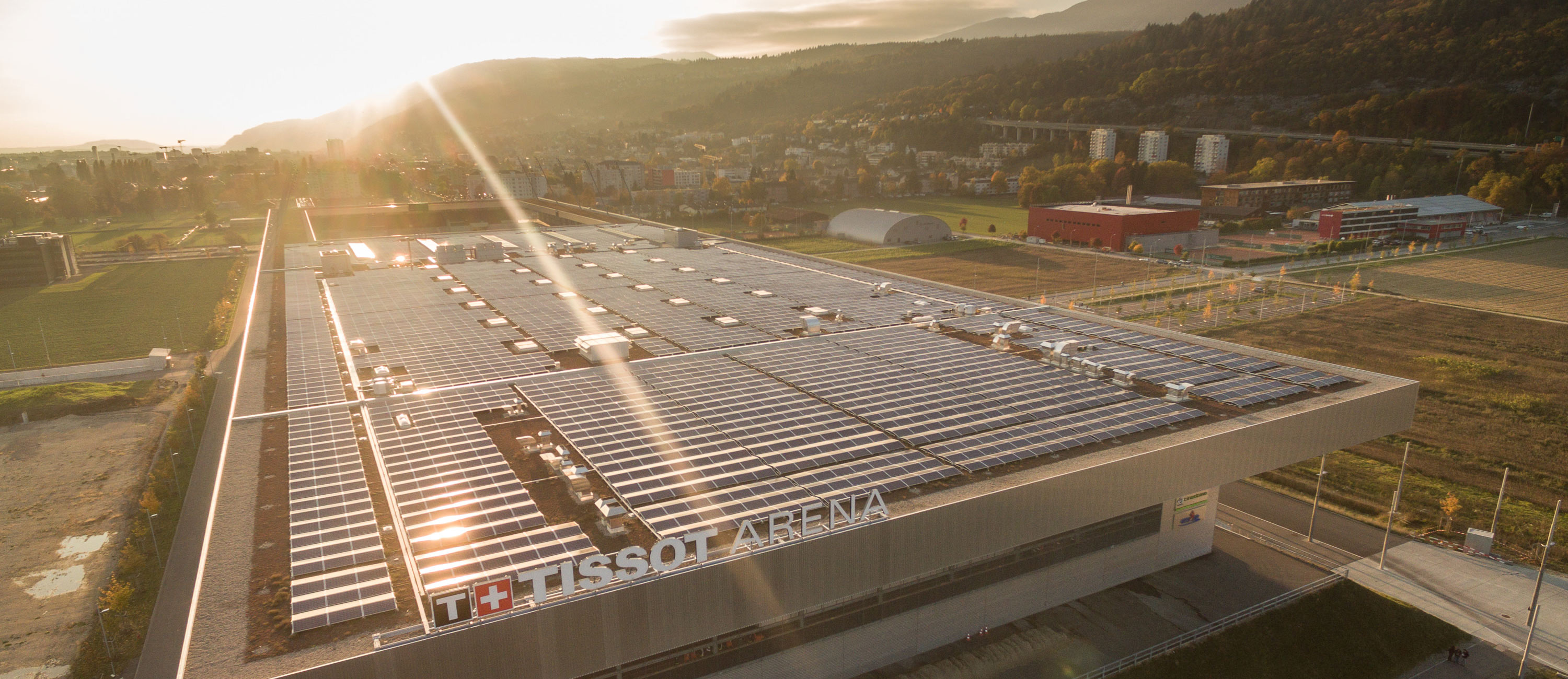 Solaranlage auf dem Dach der Tissot Arena